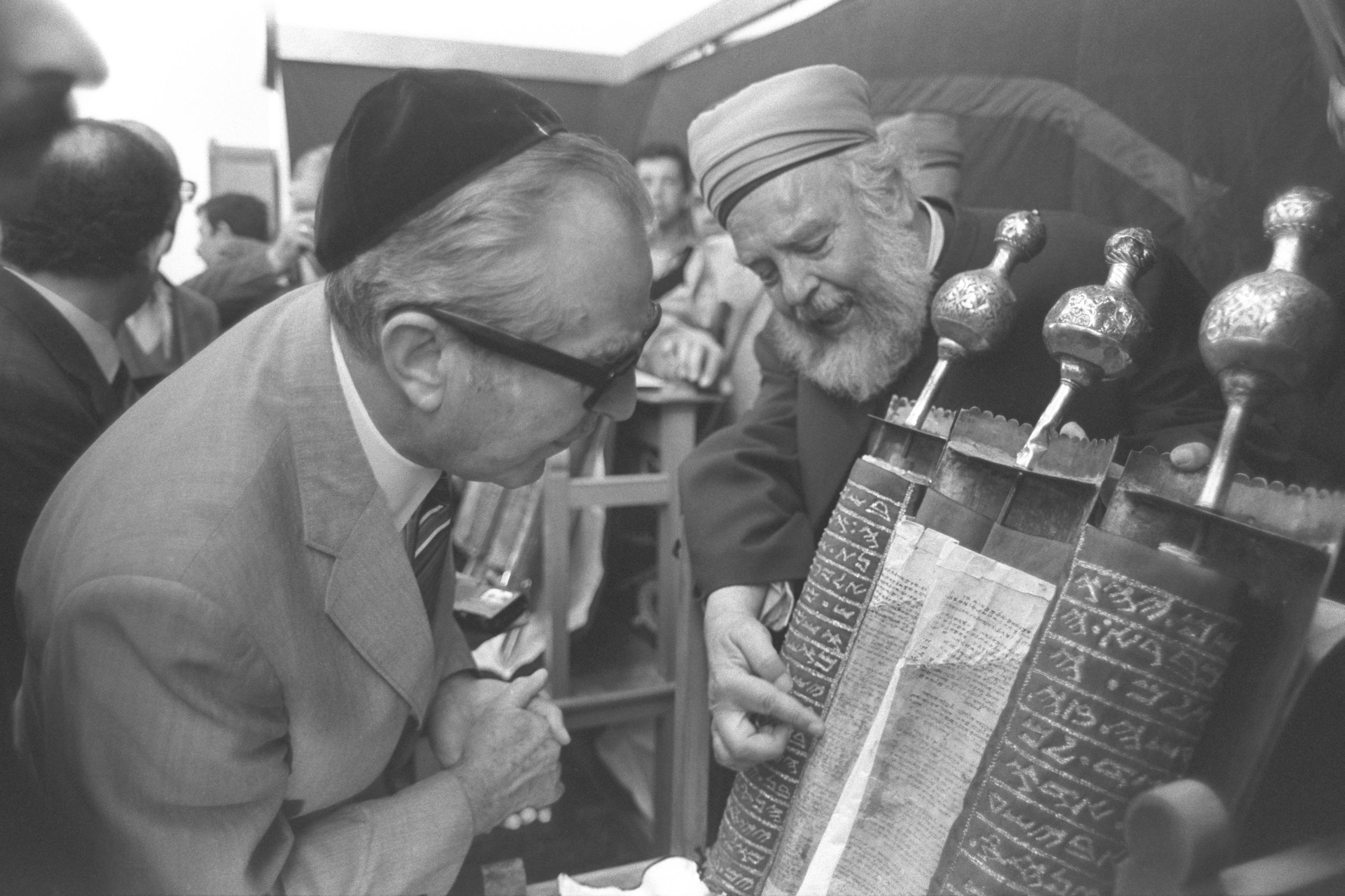 Pres. Herzog looking closely at the ancient tora scroll written according to legend by the nephew of the high priest aharon kept in the centuries old samaritan in nablus. . ביקור נשיא המדינה אצל הקהילה השומרונית בשכם. בצילום, נשיא המדינה חיים הרצוג בוחן ספר תורה בבית הכנסת הישן בעיר.